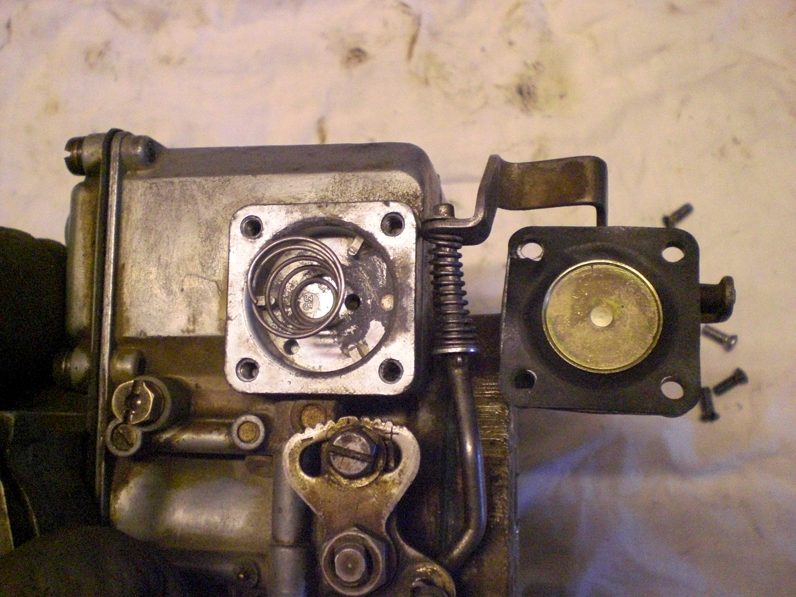 zerlegte Beschleunigerpumpe eines SOLEX PICT-3 Vergasers